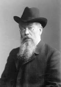 Portrait Hans Sommer